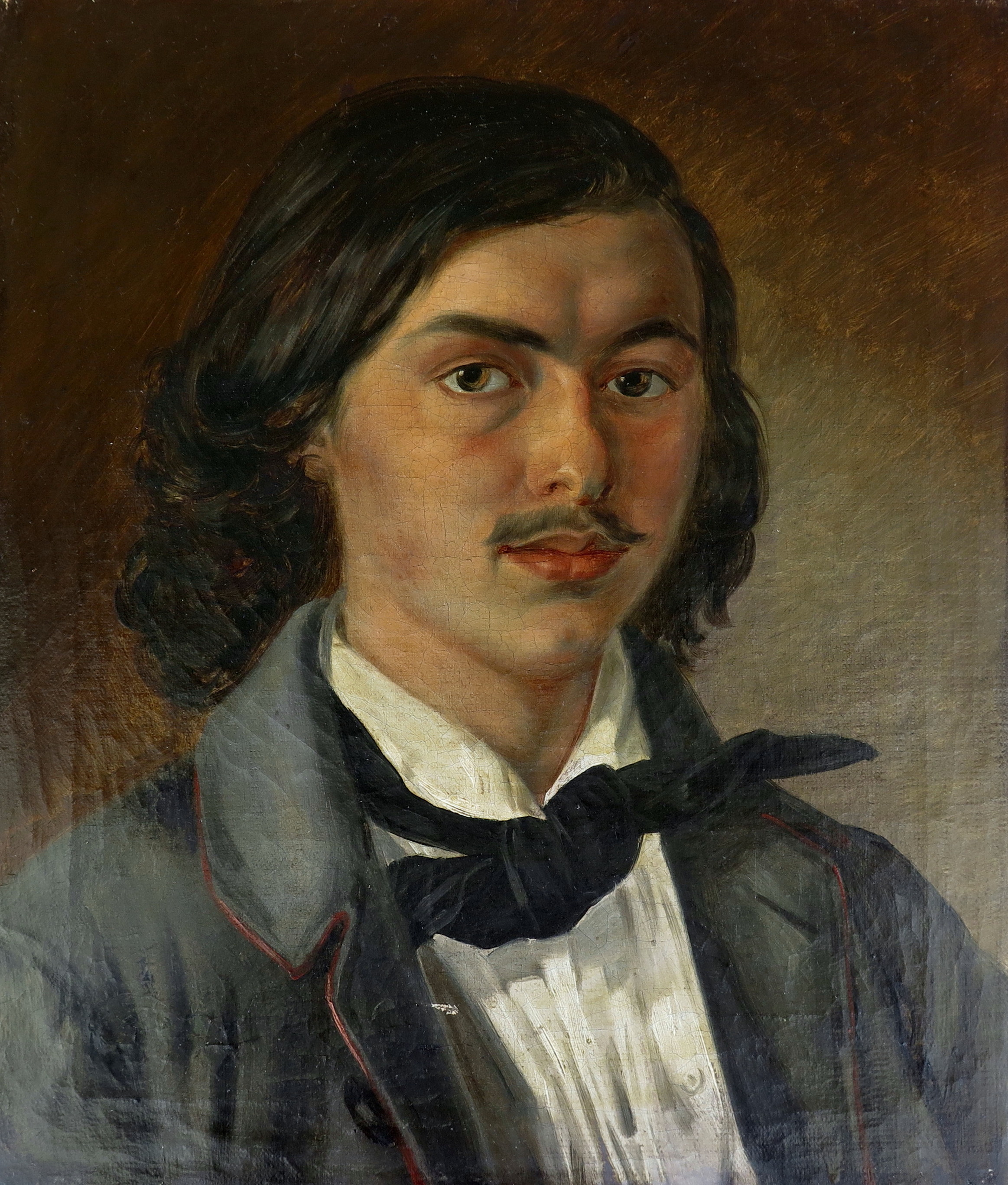 František Zdeněk Skuherský, autor portrétu neznámý. Obraz byl v majetku jeho žáka a pokračovatele na pražské konzervatoři Jindřicha Kàana z Albestů. Jeho potomci darovali obraz v roce 2018 Národnímu muzeu - Českému muzeu hudby v Praze.